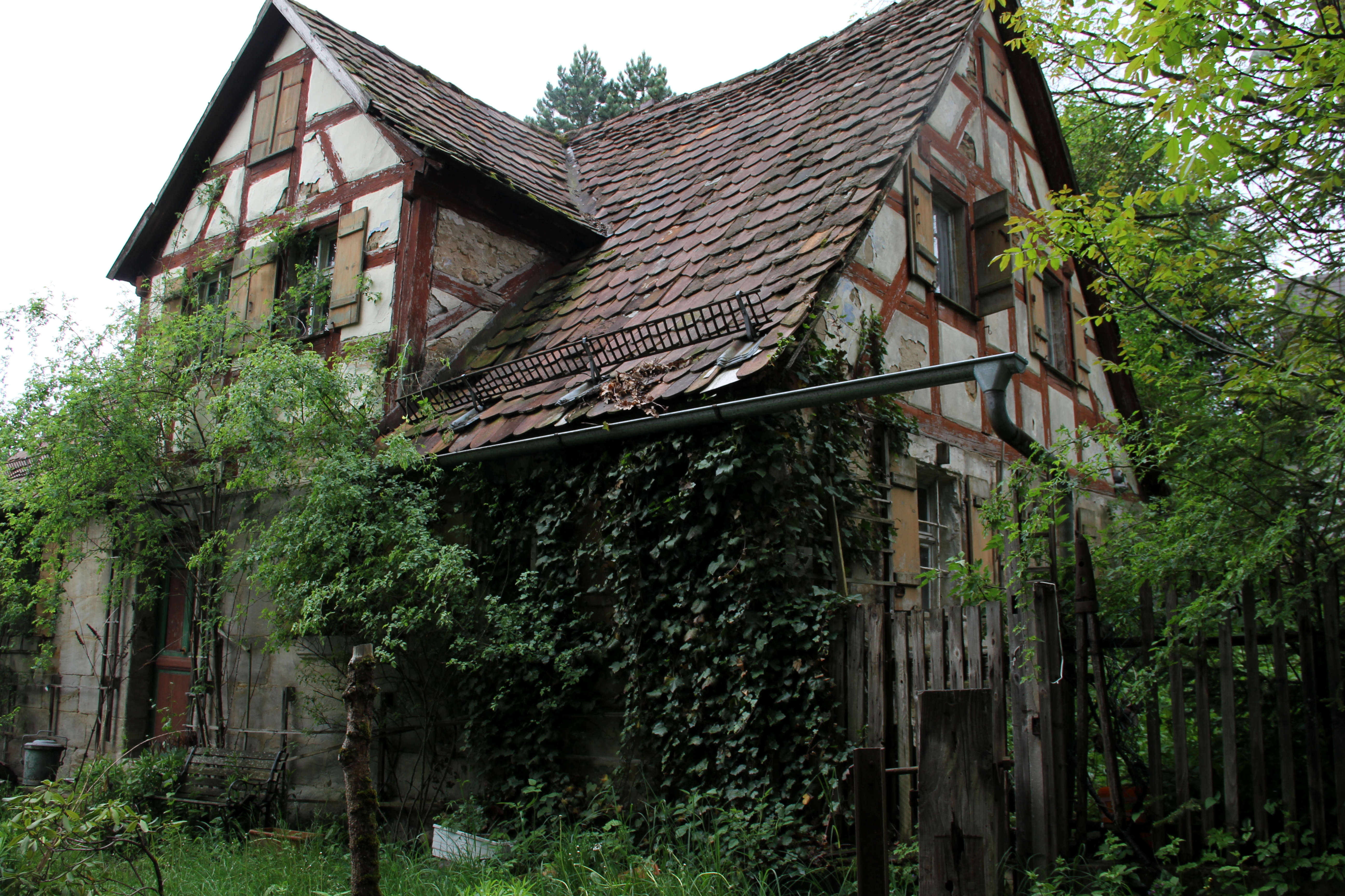 Prackenfels